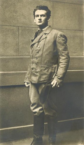 Vilém Zítek (1890 - 1956), Český operní pěvec v roli „Józi“ ve hře Lešetínský kovář (1920)